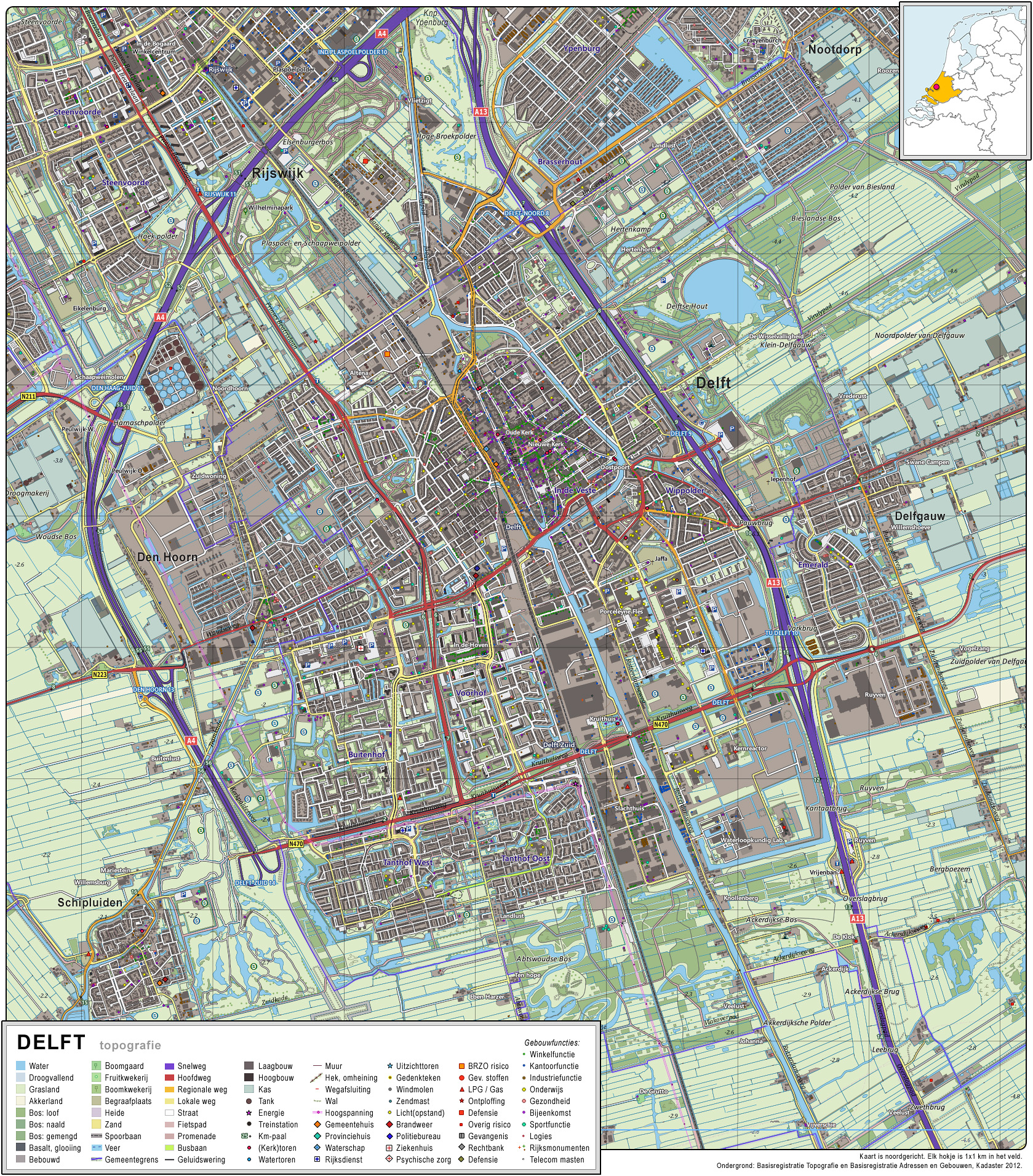 Topografisch beeld van de stad Delft. Op basis van de GML open geodata van de BRT/Top10NL (basisregistratie Topografie, Kadaster 2012), vrijgegeven door Kadaster op 30-11-2012 onder de Creative Commons BY licentie. Gebouwvlakken vanuit Open Geodata BAG extract (december 2012). Samenstelling en kleurenschema: Jan-Willem van Aalst, met QuantumGIS en Photoshop.